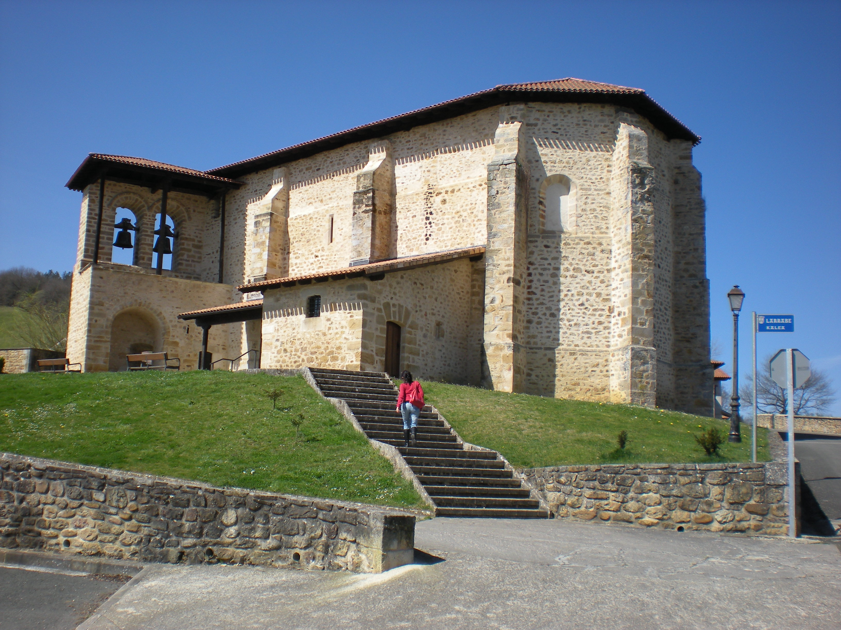 Ametzagako (Zuia, Araba) San Andres eliza, XVI. mendekoa.